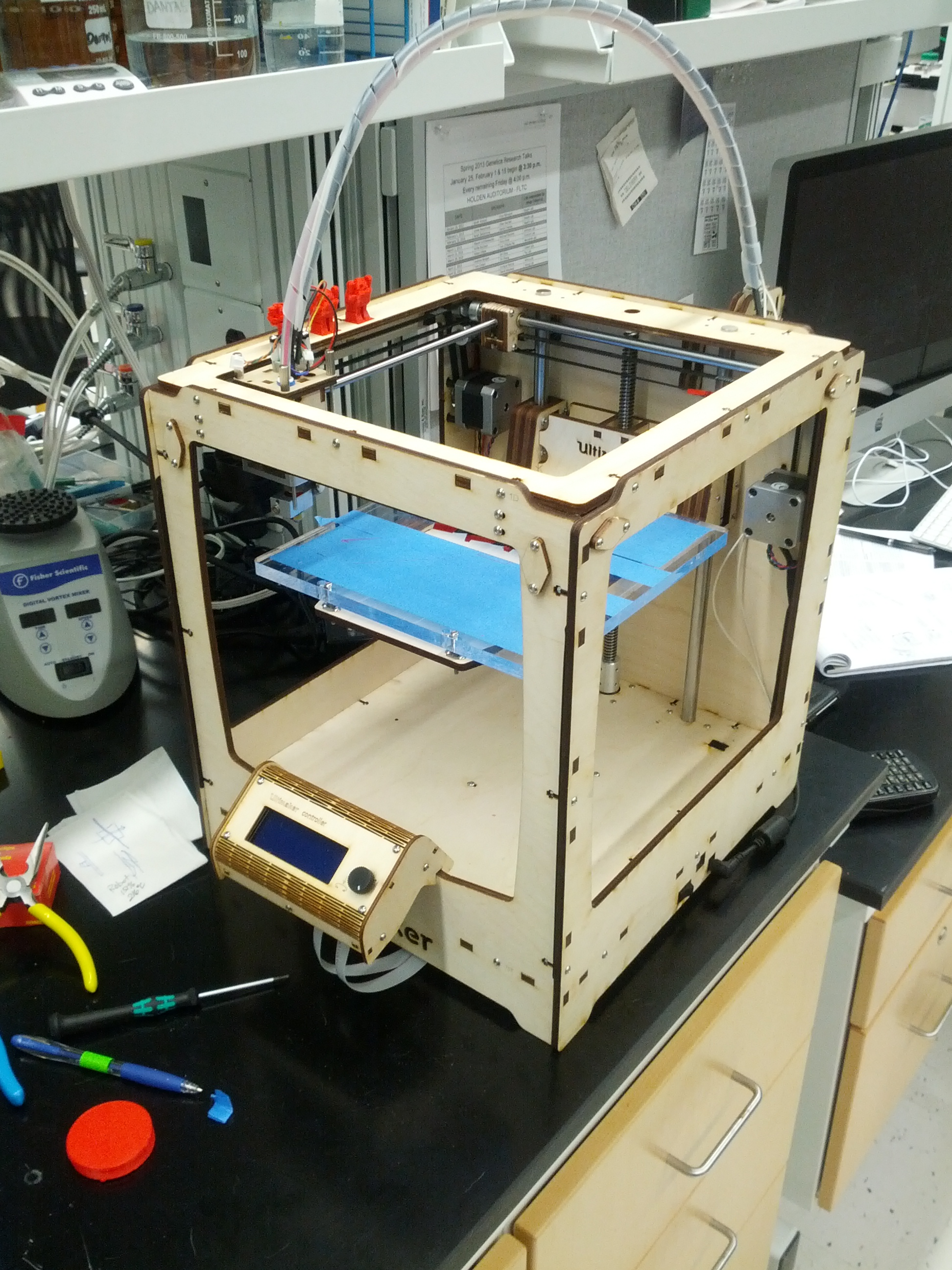 Ultimaker 3D Printer